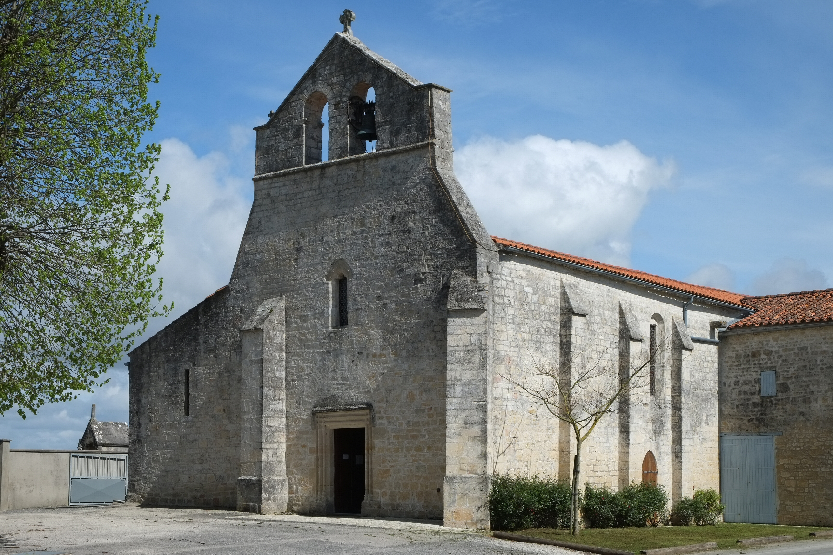 Église Saint-Pierre le Thou Charente-Maritime France